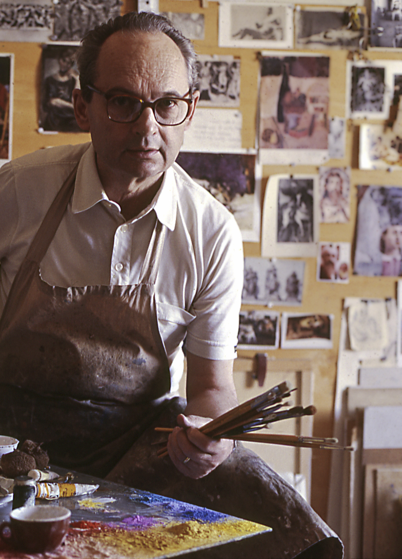 Renzo Tubaro